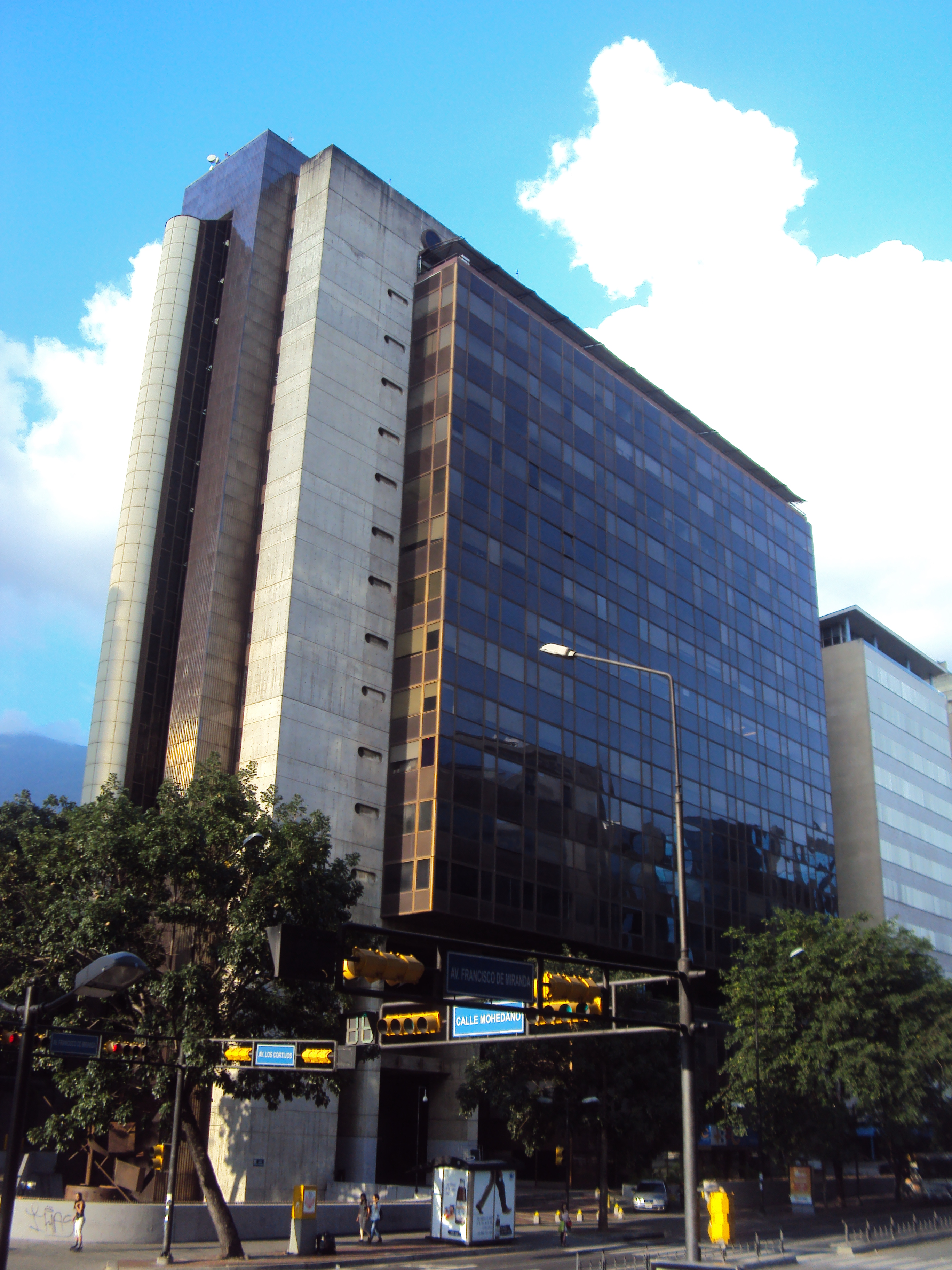 Torre Europa